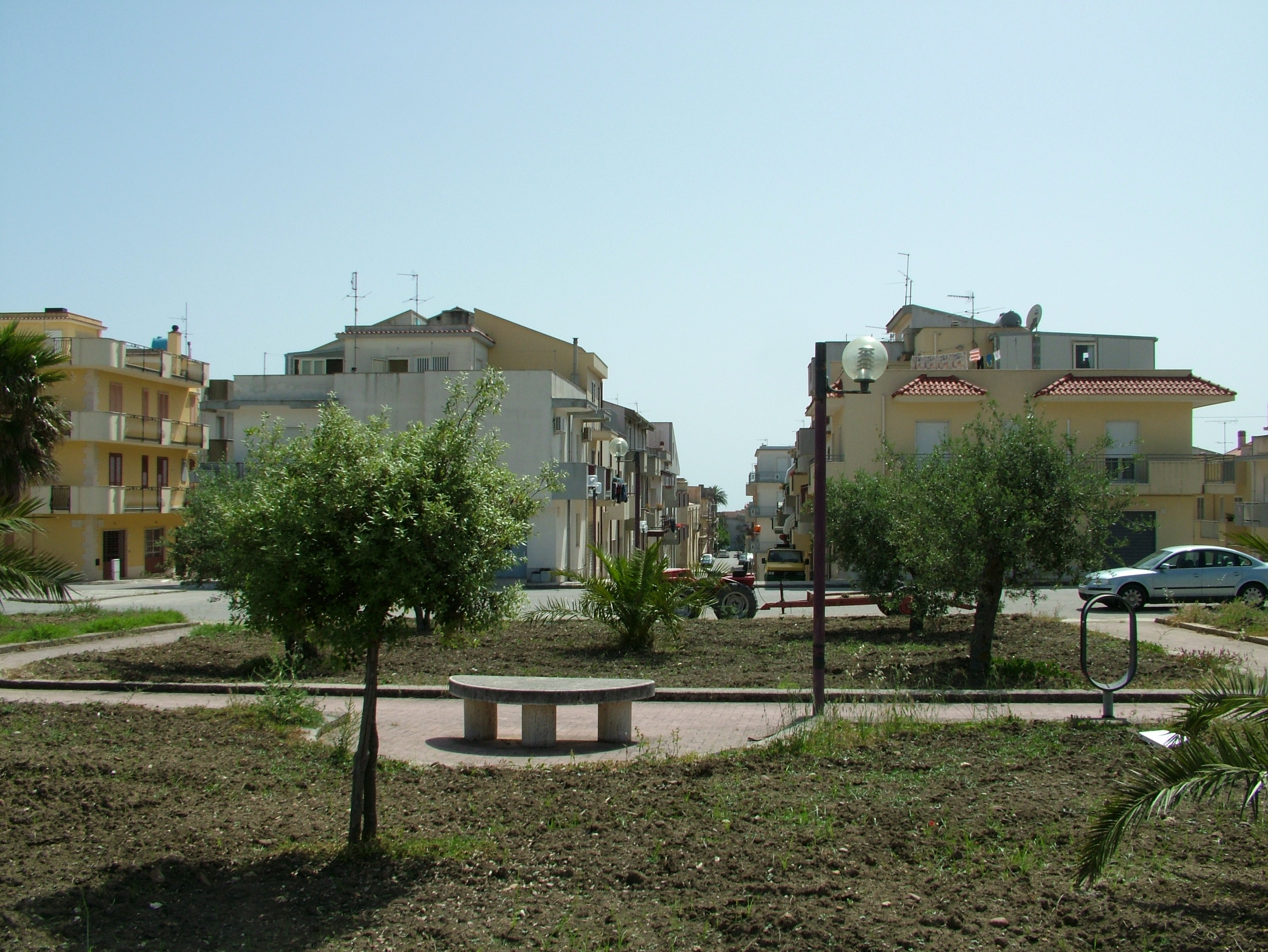 Platz in Santa Ninfa, Sizilien